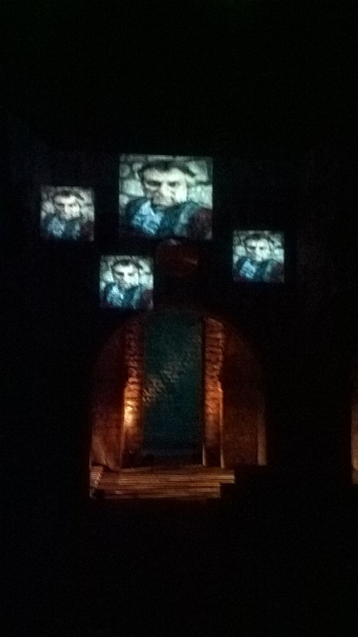 Hamlet , duh , engleski jezik